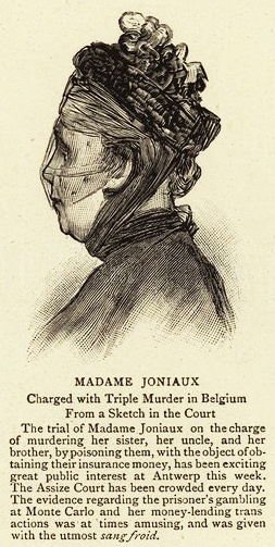 Marie Thérèse Joniaux - The Graphic - 12 janvier 1895 - croquis de cour